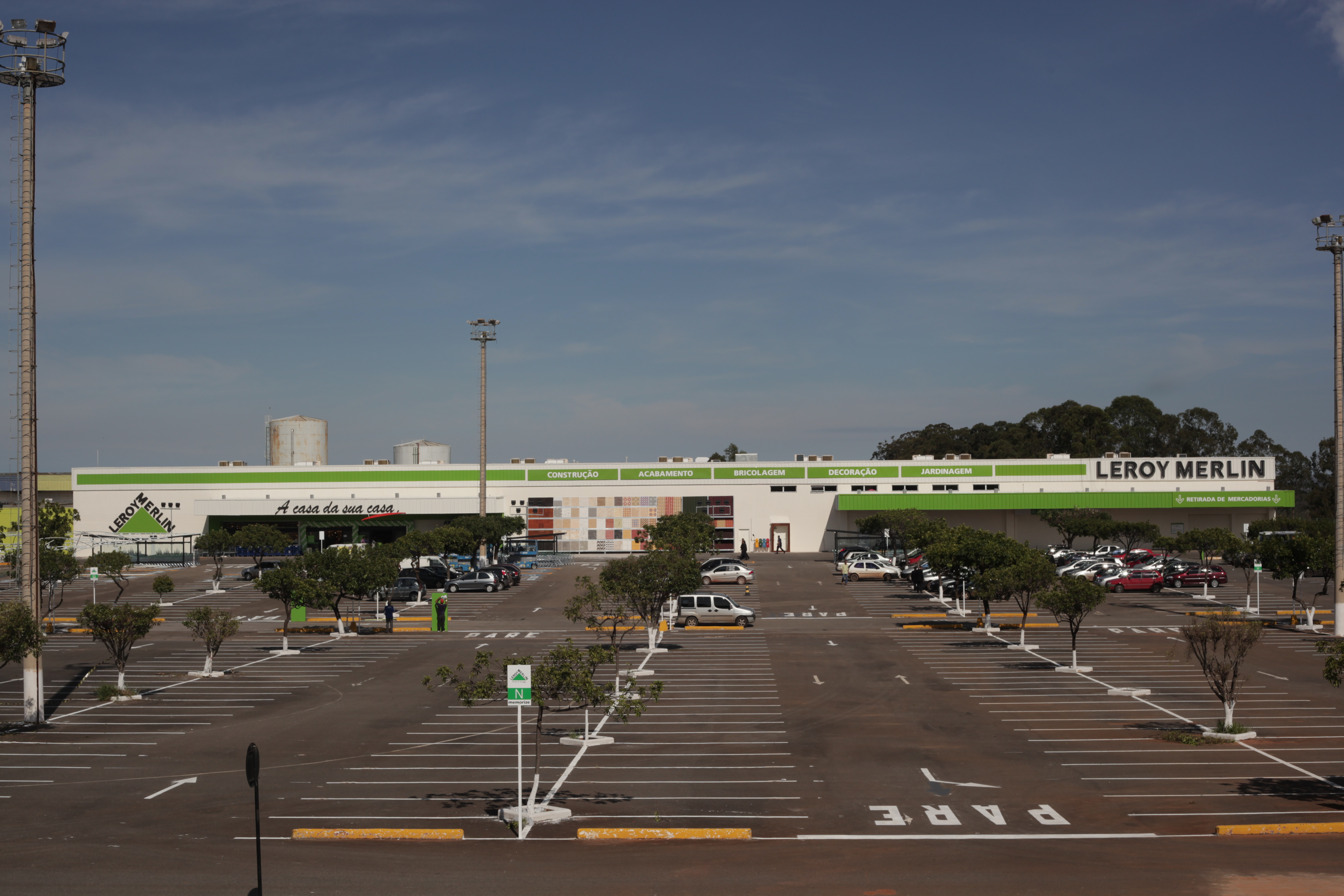 Loja da Leroy Merlin Brasil em Brasília, Distrito Federal.